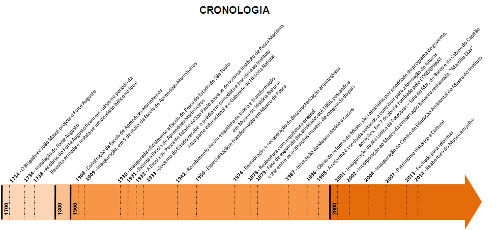 Cronologia do Museu de Pesca da cidade de Santos/ SP - Brasil